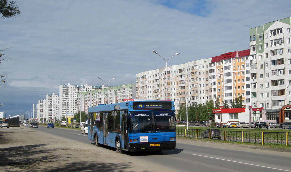 МАЗ-103 в Нижневартовске